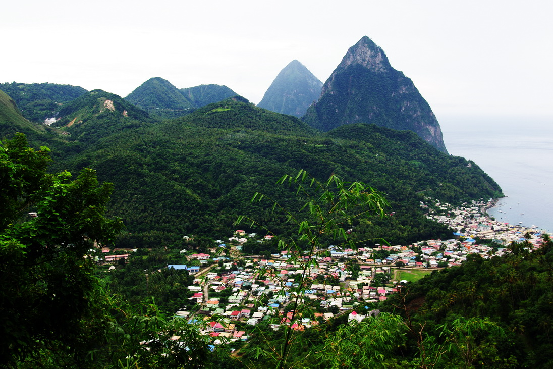 Soufrière am Fuß der Pitons